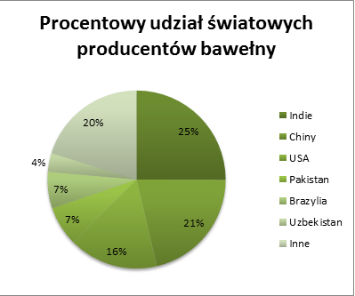 Wykres przedstawia udział światowych procentów bawełny